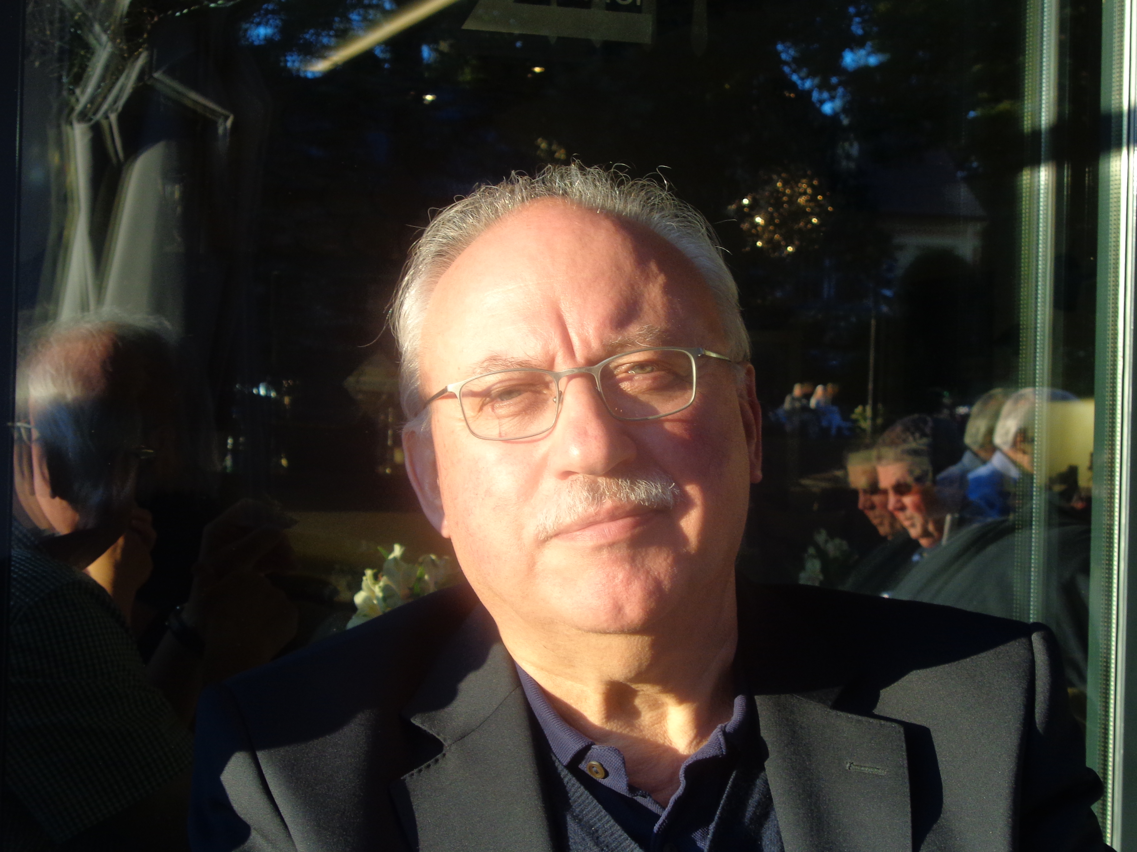 Porträtfotografie von Prof. Dr. Alexander Rauchfuss